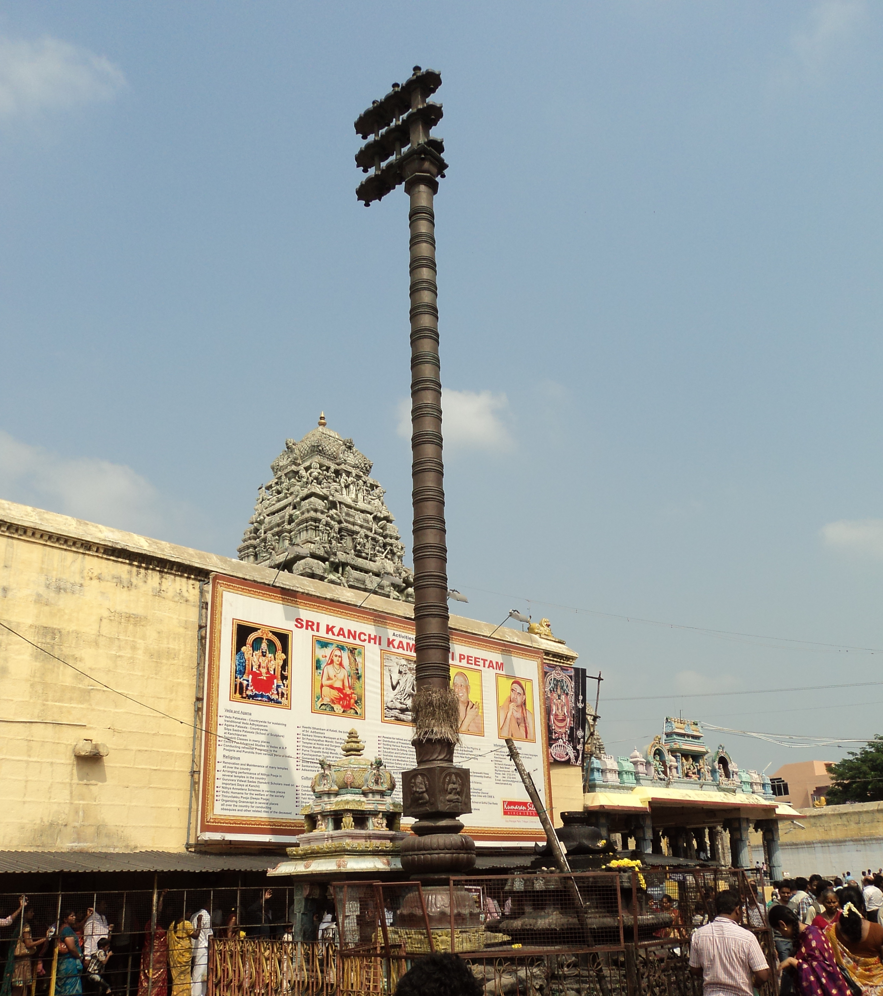 காஞ்சிபுரம் காமாட்சியம்மன் கோயில் கொடி மரம்